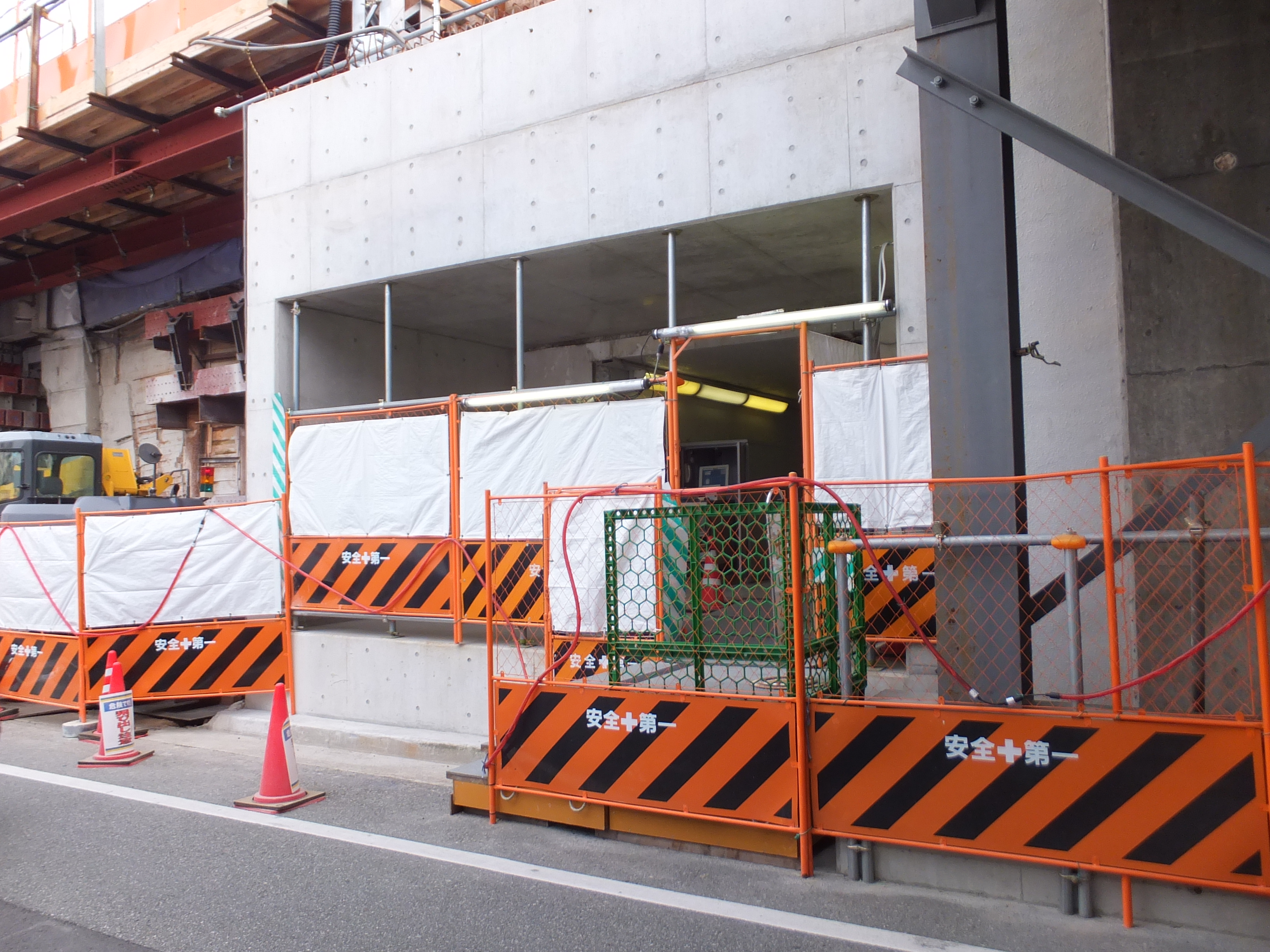 阪神甲子園駅にあった、西口の北側に出られた臨時改札口。使用されたのはプロ野球の試合終了直後程度。自動改札口はないので、専用の端末で係員が1枚ずつ出場処理を行った。